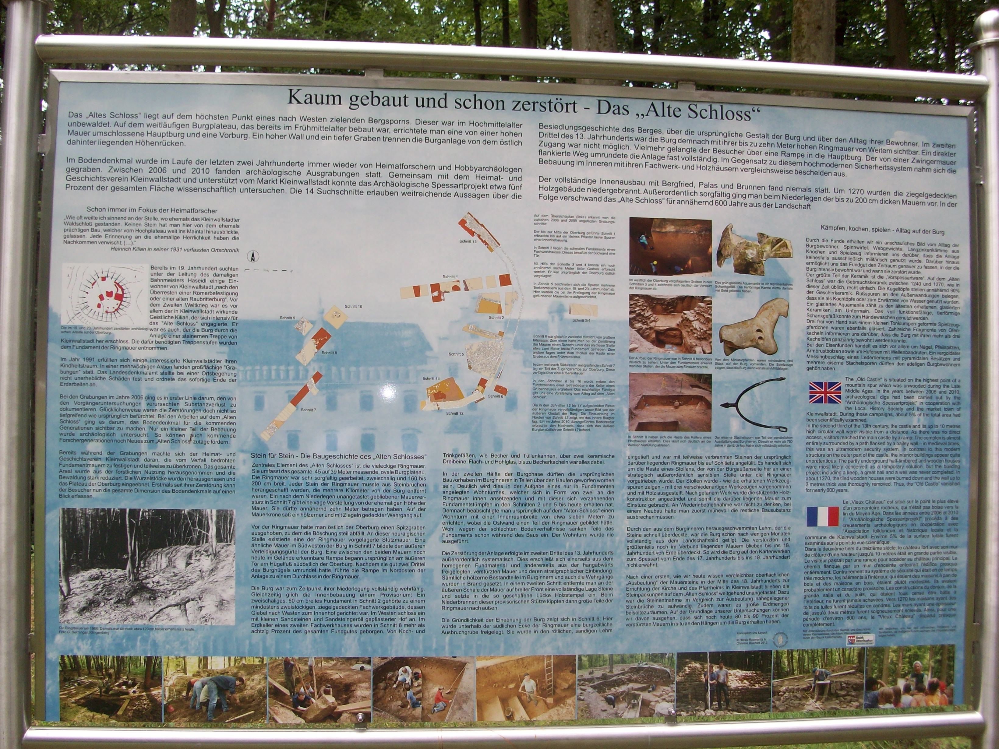 Informationstafel zum Burgstall